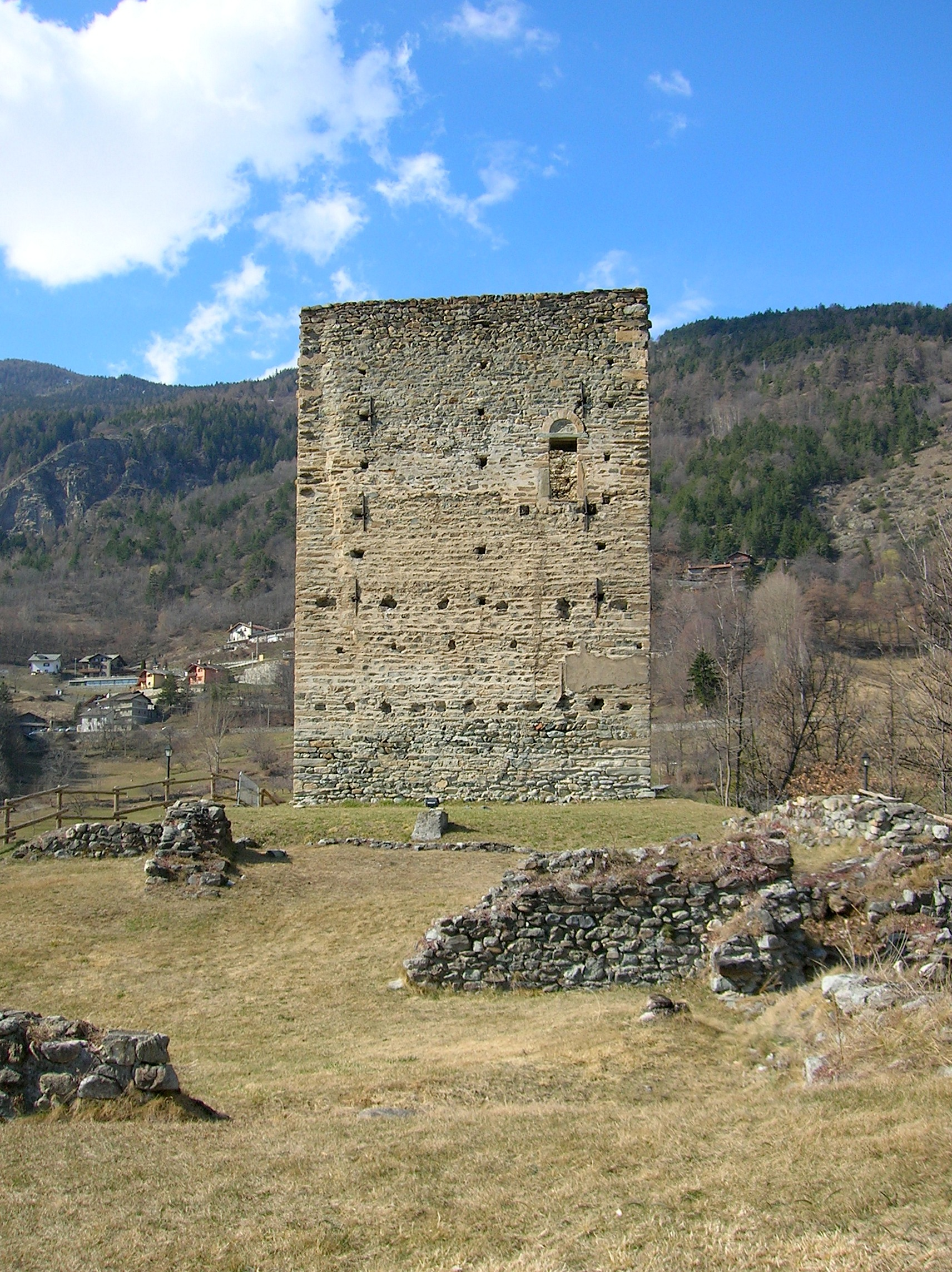 Torre di Gignod, Gignod, Valle d'Aosta, Italia.